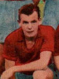 Sven-Ove Svensson, Hälsingborgs IF på Olympia den 30 juli 1944 inför en allsvensk match mot Halmstads BK. Resultat: 1-2.